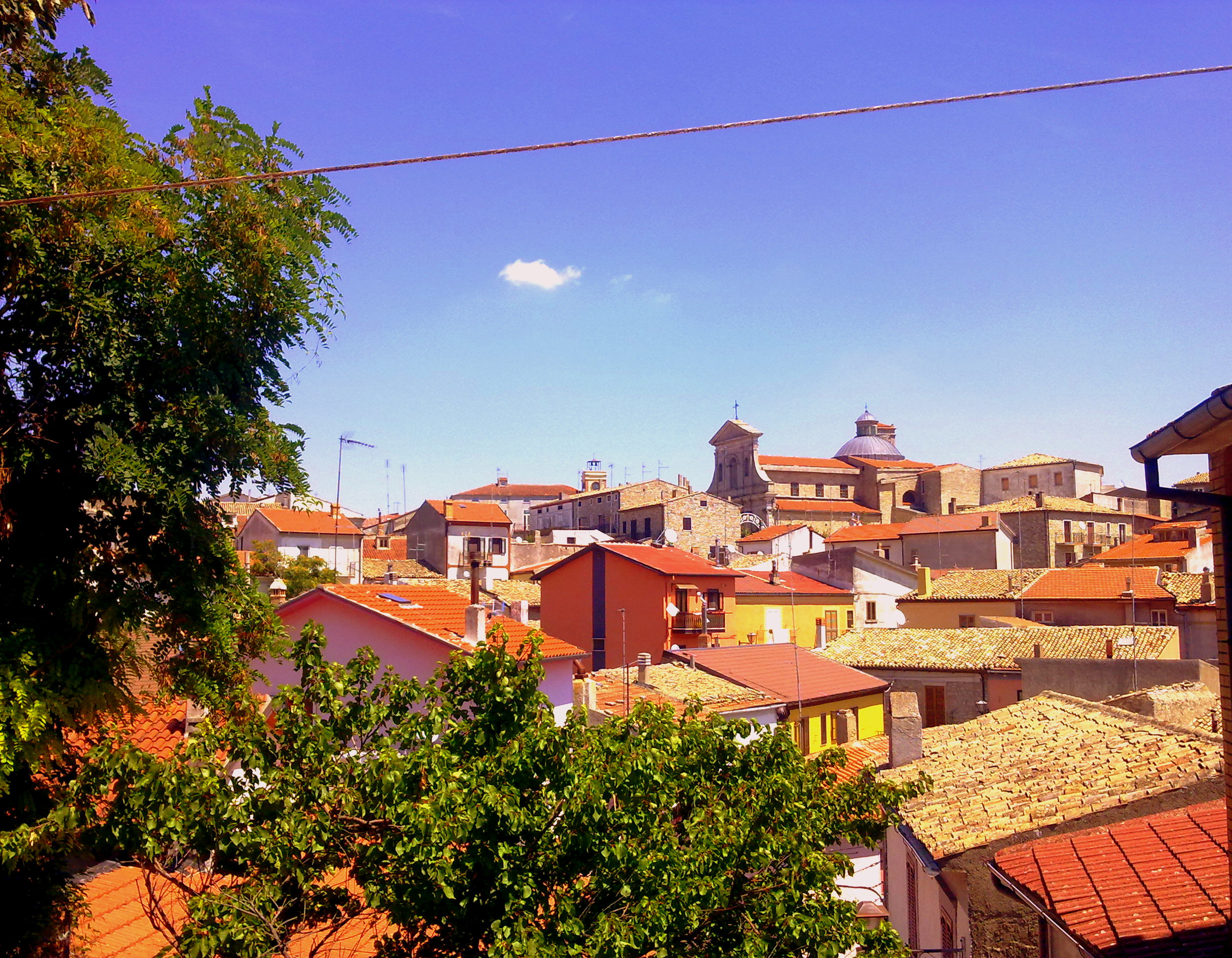 veduta panoramica di Faeto